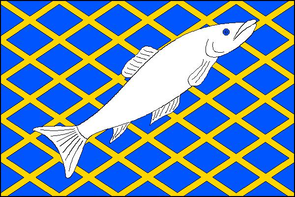 Vlajka obce Ryžoviště (okres Bruntál)